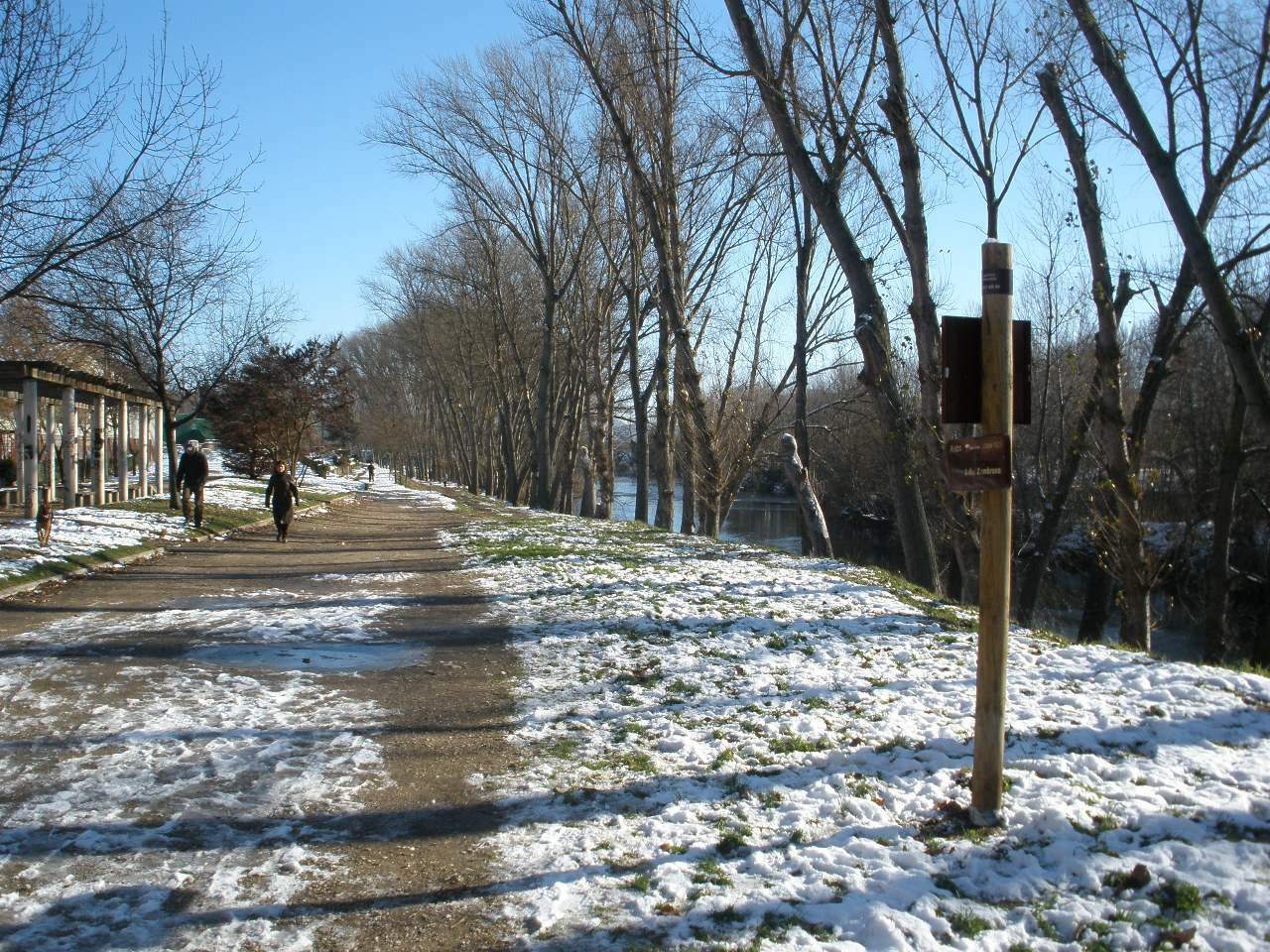 Miranda de Ebro (Burgos)